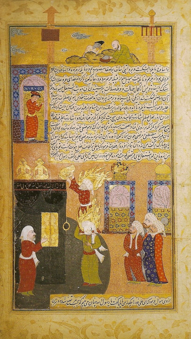 Mahoma y Ali ,purifican la Kaaba de idolos . Miniatura del "Raudat al Safa" de Mir Havant Shiraz, Iran, 1585-1595